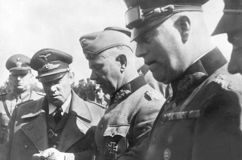 Von der deutschen Ostfront Unser Bild zeigt (von rechts nach links) Generaloberst Keitel, General der Artillerie von Reichenau, Generalmajor Bodenschatz und General der Polizei Daluege bei einer Kartenbesprechung im Operationsgebiet. PK-Gregor 13.9.1939 [Herausgabedatum]